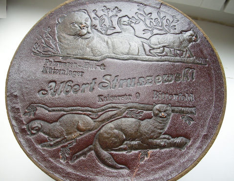 Pelzwaren Albert Struszewski, Bitterfeld, Deckel einer Muffschachtel Kaiserstr. 9